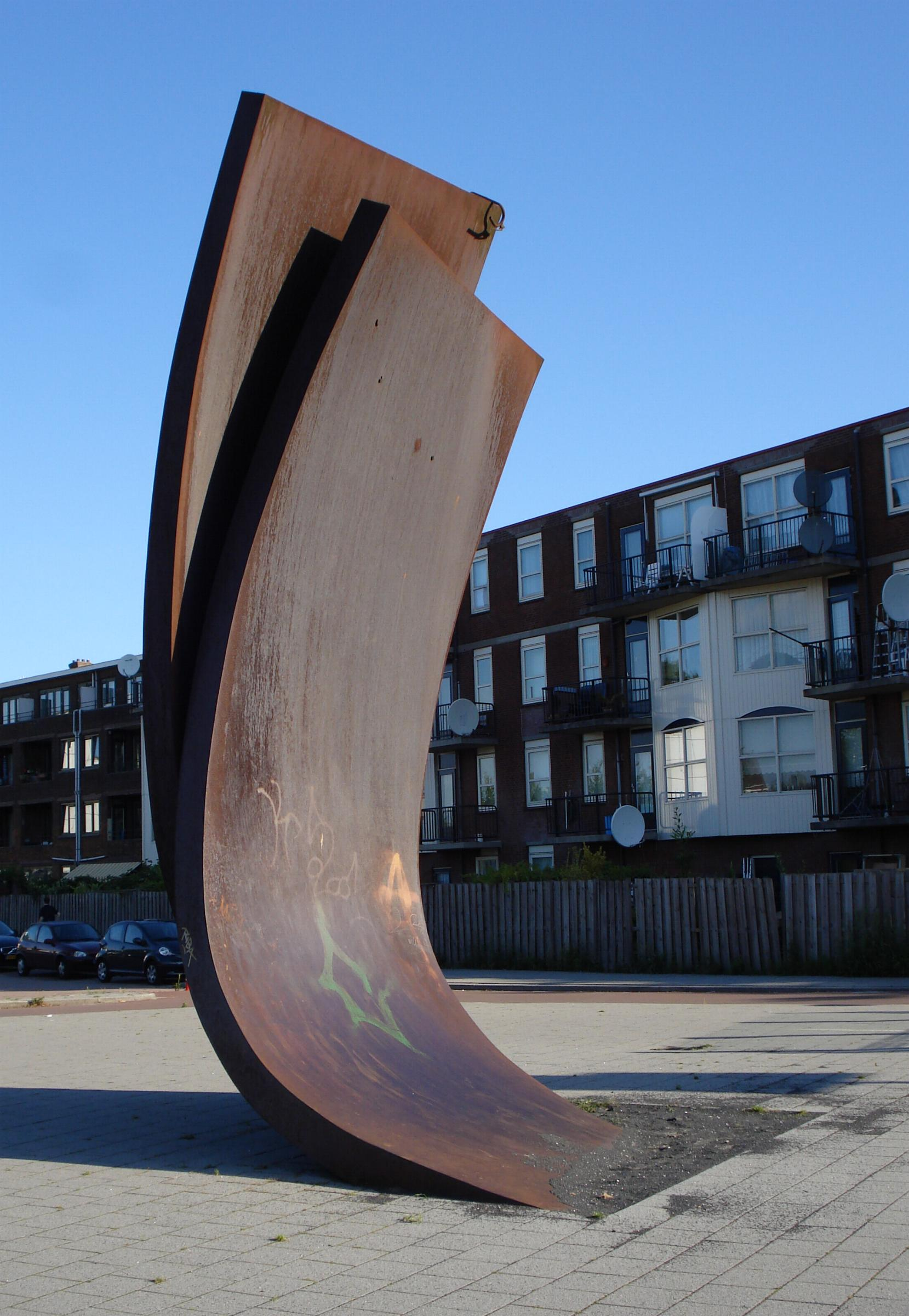 Rotterdam, Gerdesiaweg, Kunstwerk zonder titel van Gerard Walraeven. Rotterdam/The Netherlands.